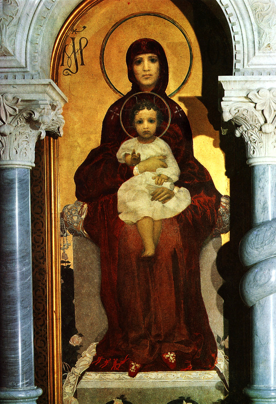 «Богородиця з Дитям» М. О. Врубель, 1885 р. Венеція (олійний живопис на цинкових листах)